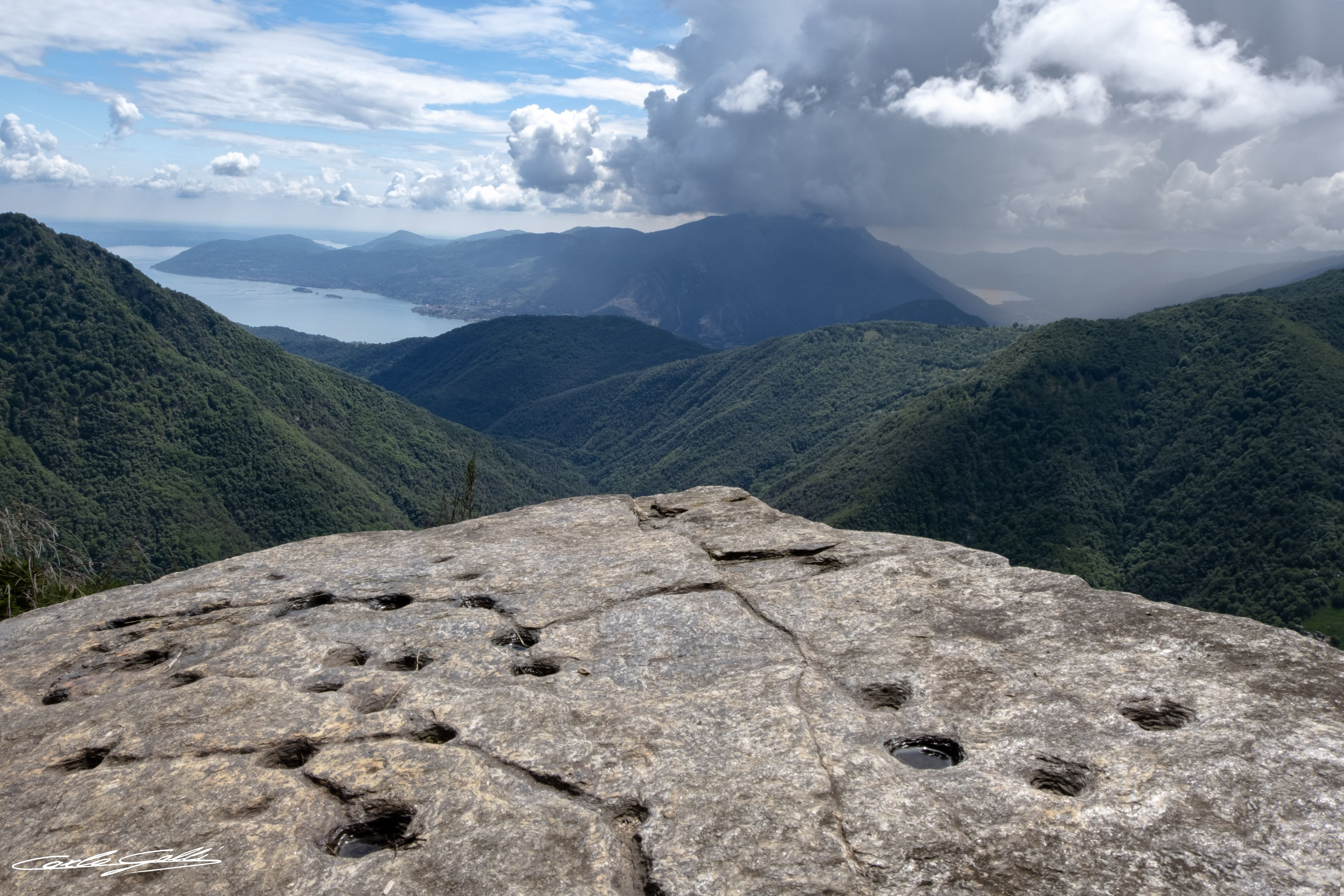 Parco nazionale della Val Grande (Q358729)